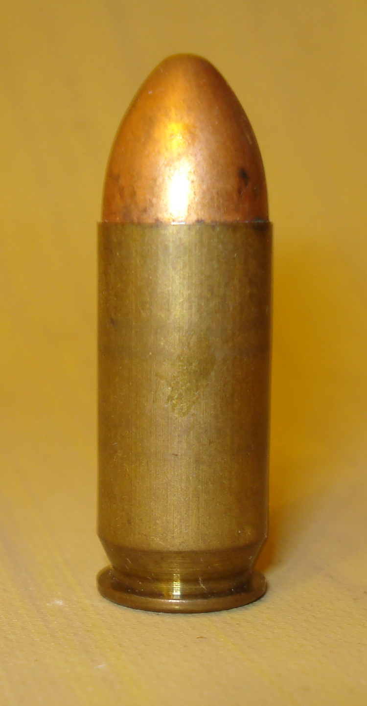 Усиленный патрон .45 Ремингтон-Томпсон к опытному пистолету-пулемёту Томпсон М1923.